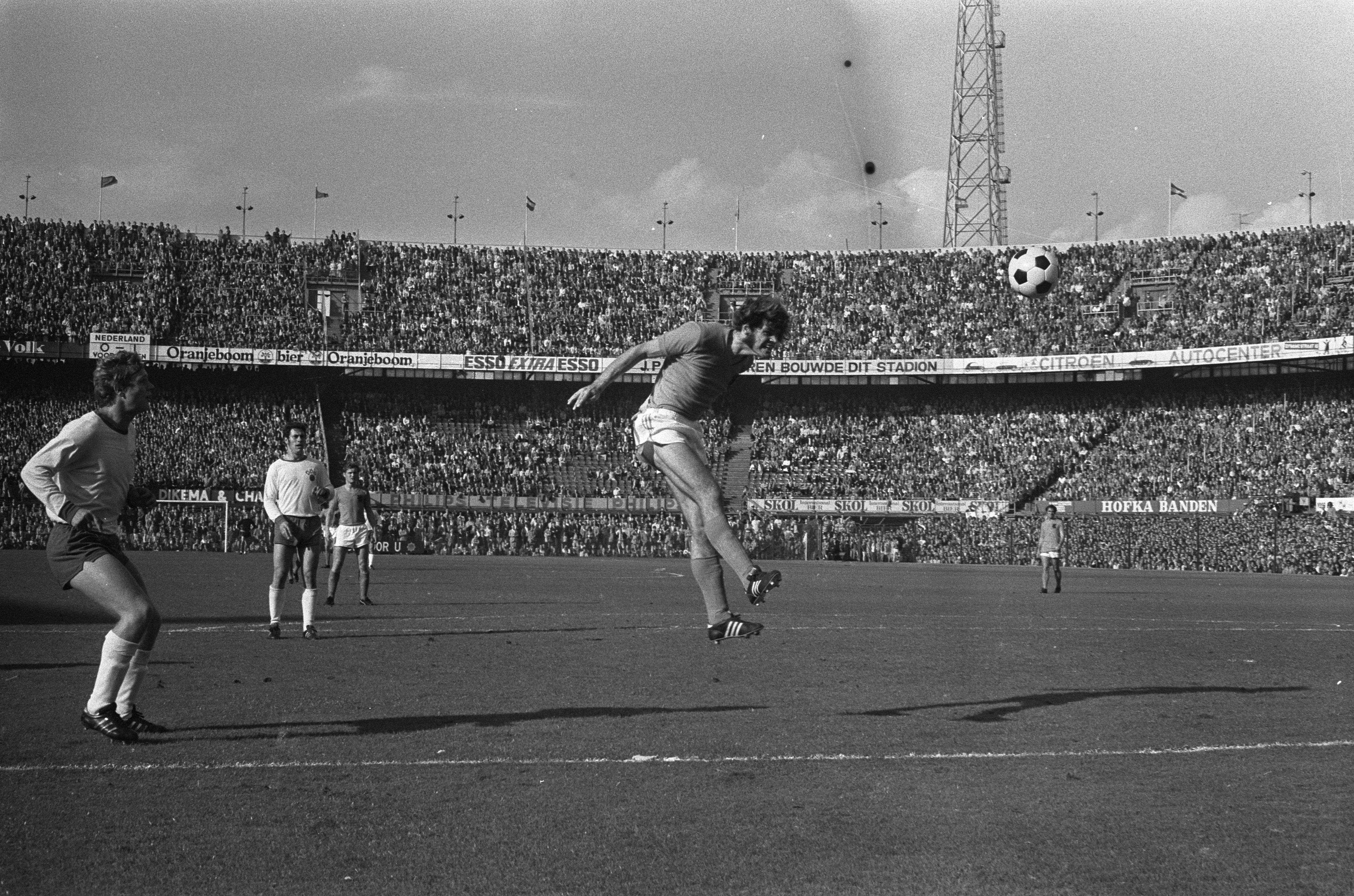 Collectie / Archief : Fotocollectie Anefo Reportage / Serie : [ onbekend ] Beschrijving : Nederland tegen Oost Duitsland 3-2, Barry Hulshoff kopt in Datum : 10 oktober 1971 Locatie : D.D.R., Duitsland, Nederland Trefwoorden : sport, voetbal Persoonsnaam : Barry Hulshoff Fotograaf : Verhoeff, Bert / Anefo Auteursrechthebbende : Nationaal Archief Materiaalsoort : Negatief (zwart/wit) Nummer archiefinventaris : bekijk toegang 2.24.01.05 Bestanddeelnummer : 925-0330